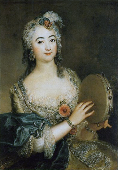 Портрет танцовщицы Барбары Кампанини, она же Барбарина (1724-1799), работы Антуана Пэна (1683-1757), холст/масло. Место расположения картины: Frisörmuseum, Фишеркоппель 5, 24340 Эккернфёрде, Германия